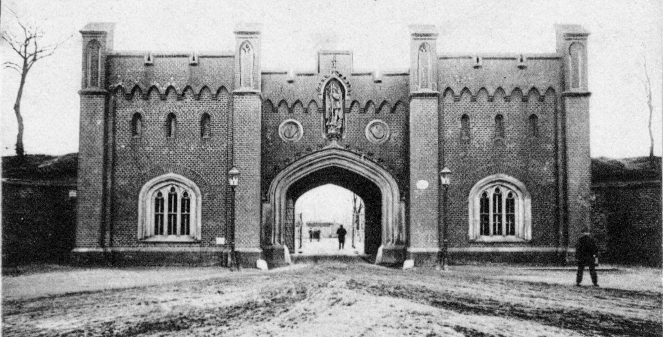 Eichwald Thor - innen